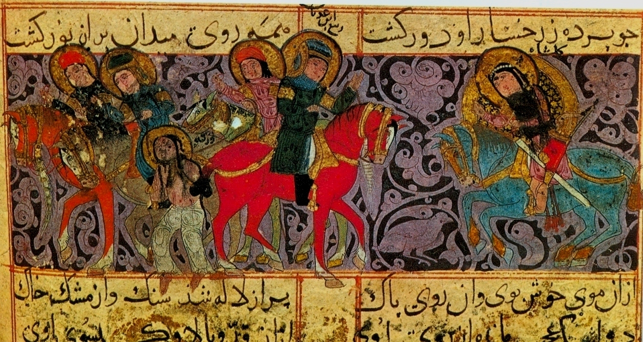 Varka i Golshah. Раненый Варка взят в плен Раби бен Аднаном восседащим на красном коне, а Гольшах спешит ему на помощь. Варка и Гольшах